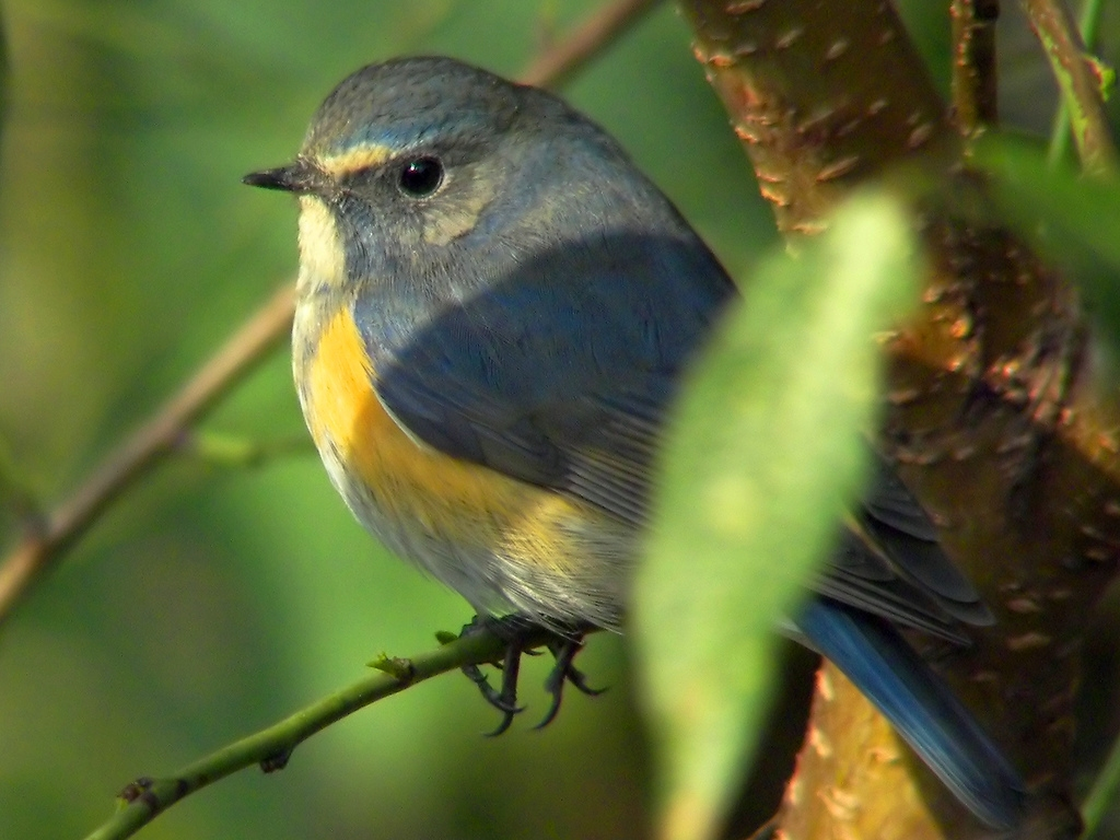 Red-flanked Bluetail Tarsiger cyanurus, Hong Kong